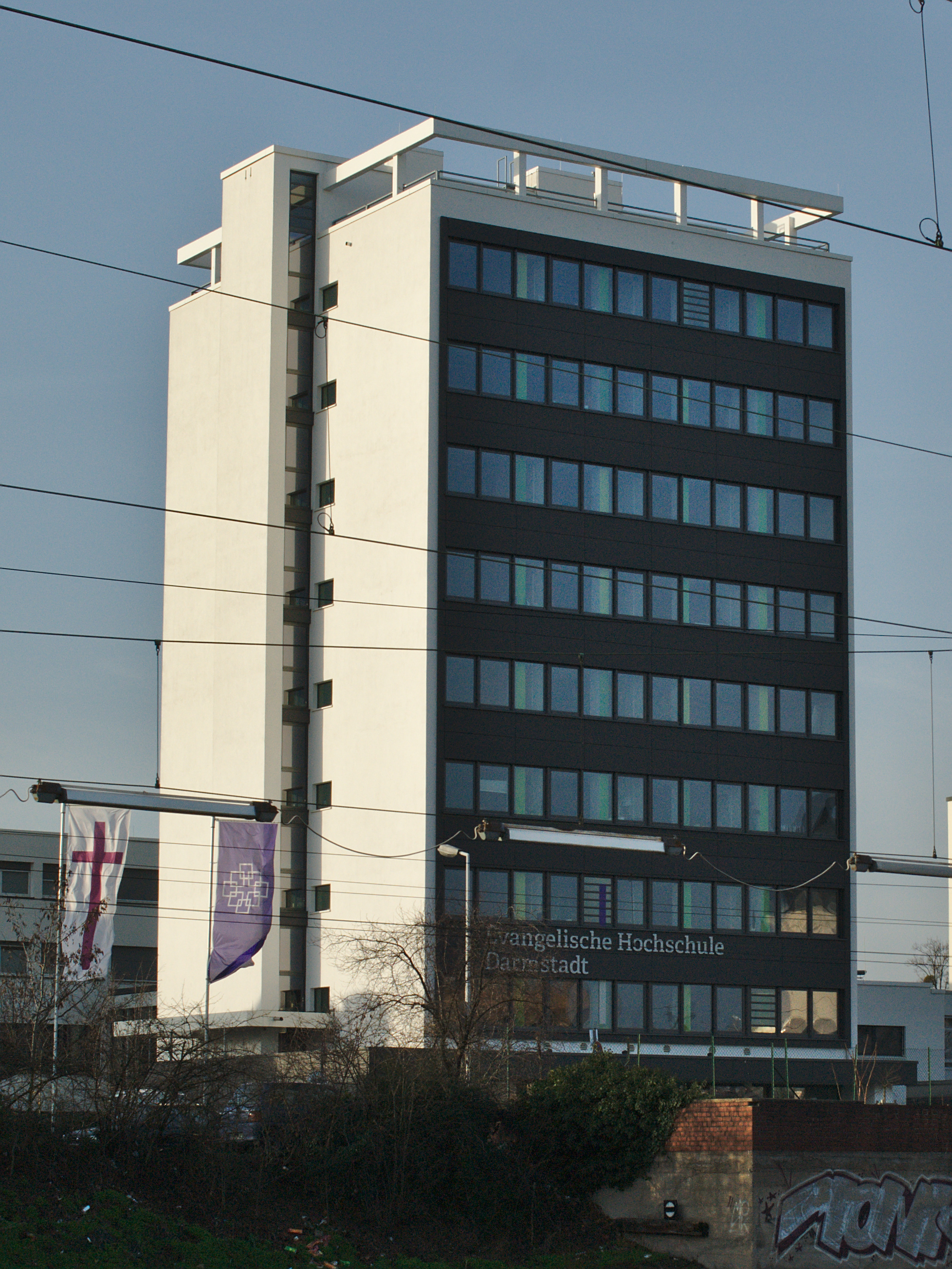 Evangelische Hochschule Darmstadt, main building as seen from Darmstadt Hauptbahnhof